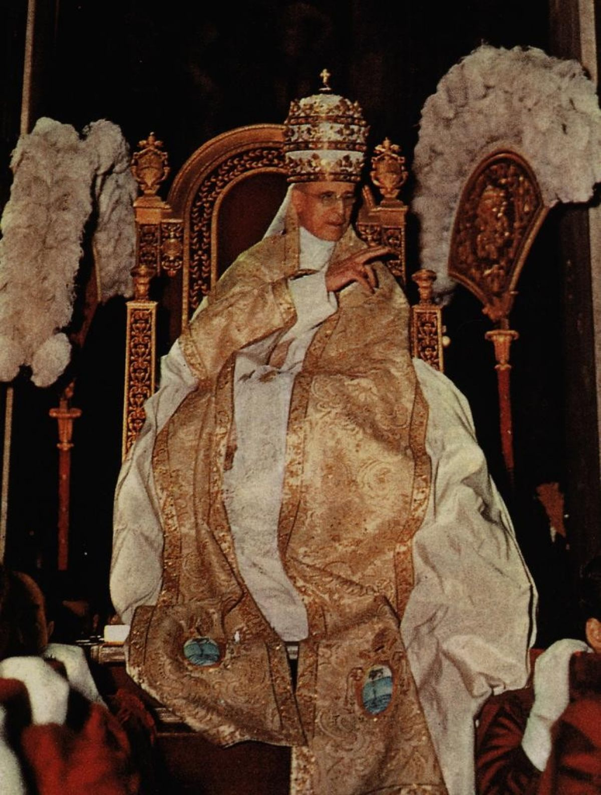 Pius XII in sede gestatoria mantum papale sumens